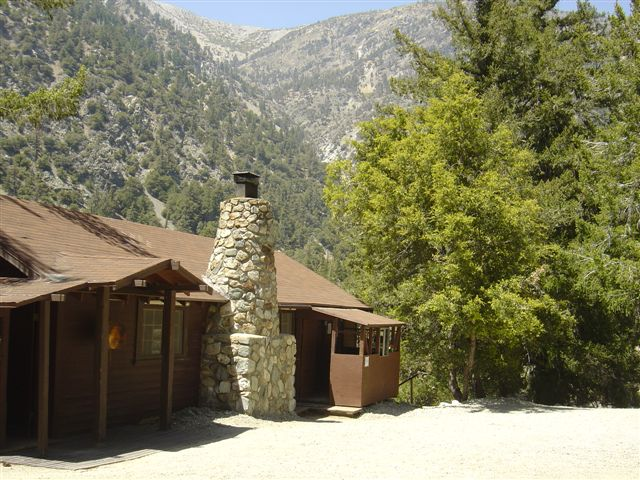 Zendo at Mount Baldy Zen Center.DSC01728.JPG